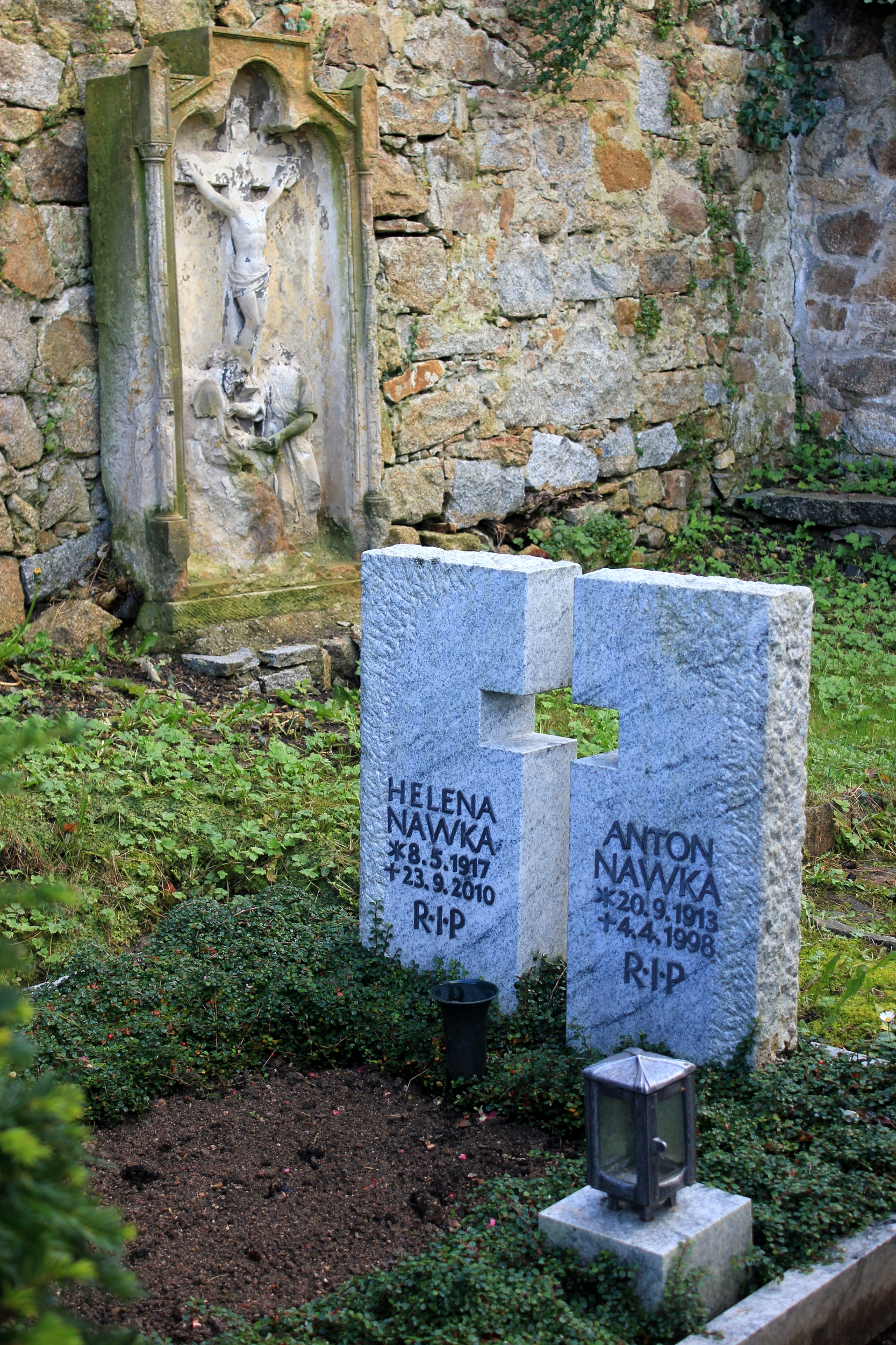 Hornjoserbsce: Row Antona Nawki na Budyskim Mikławšku.